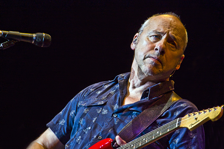 Mark Knopfler in Barcelona. Foto: Rosario López